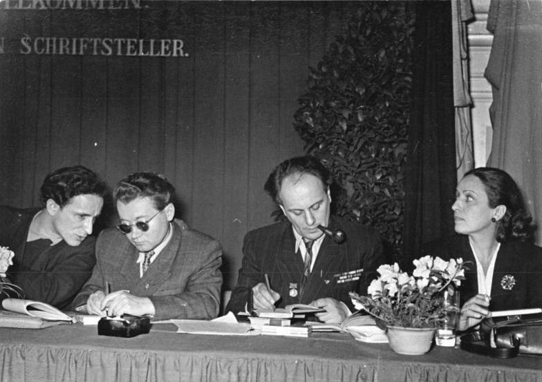 Zentralbild Illner 8.3.1954 Konferenz junger Autoren in Leipzig Im Beisien von 400 Nachwuchsschriftstellern wurde am 6. und 7. März 1954 in Leipzig die erste Konferenz junger Autoren unserer Republik durchgeführt. Die Konferenz erarbeitete in den beiden Konferenztagen Vorschläge zur planmässigen wissenschaftlichen Förderung junger Autoren. Diese Vorschläge werden dem IV. deutschen Schriftstellerkongress zugeleitet werden. UBz: Gäste aus der Sowjetunion nahmen an der Konferenz teil: (V.l.n.r) Neben dem deutschen Schriftsteller Paul Wiens der Autor des Romans "Fern von Moskau" Wassilij Achajiw und der sowjetische Lyriker und Verfasser vieler Jugendlieder Jewgenij Dolmatowskij, daneben die Schriftstellerin und Filmautorin Alex Wedding.